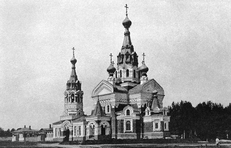 Храм Спаса Нерукотворного в Серпухове, фотография начала XX века